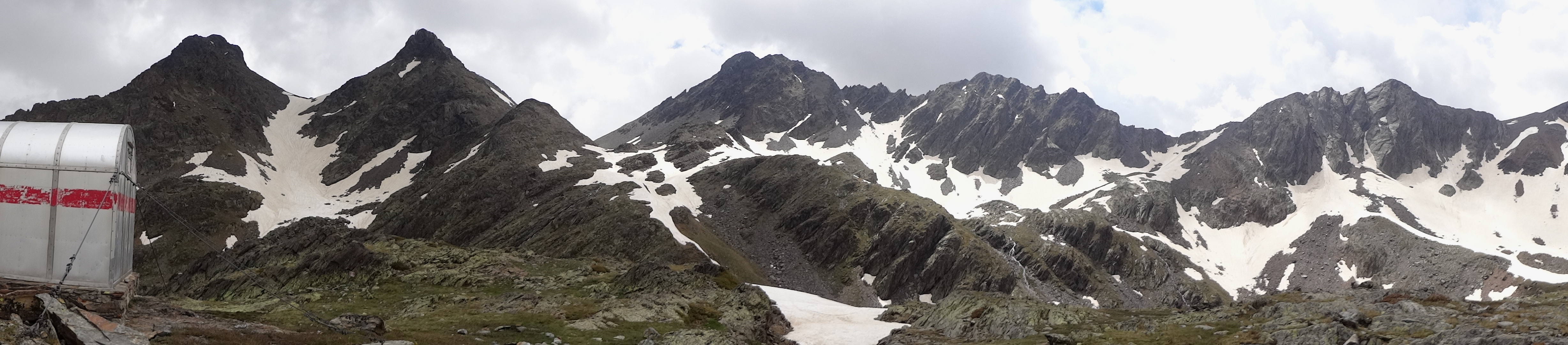 Parc de l'Alt Pirineu This is a a photo of a natural area in Catalonia, Spain, with id: ES510084